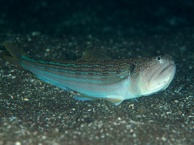 オキエソ Trachinocephalus myops